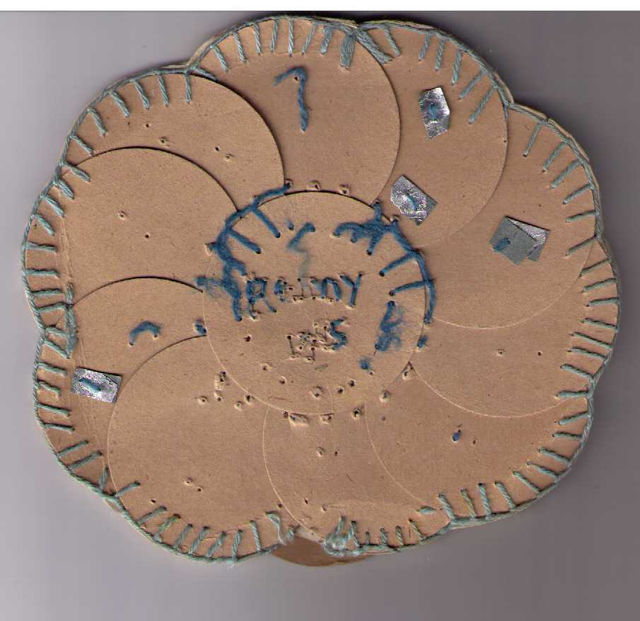 Souvenir van mevrouw van Ommen, lid van het Agfacommando van Dachau, voorkant